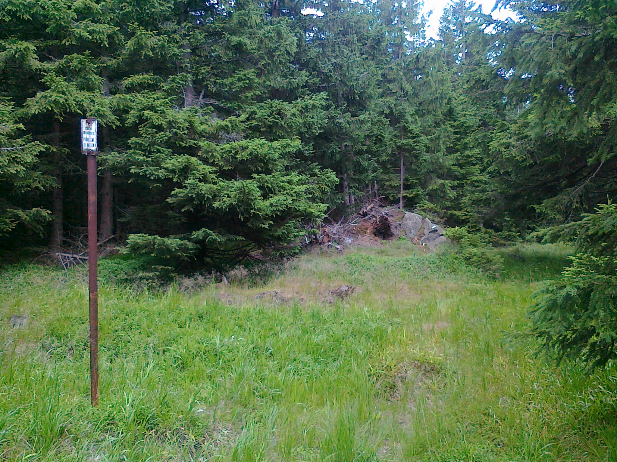 Punkt geodezyjny na szczycie góry Lyra - 1103 m